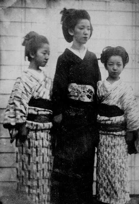 島津斉彬が撮影したと伝えられている写真。斉彬の娘たち。左より典姫(のりひめ）、暐姫(てるひめ)、寧姫(やすひめ)。湿板写真。